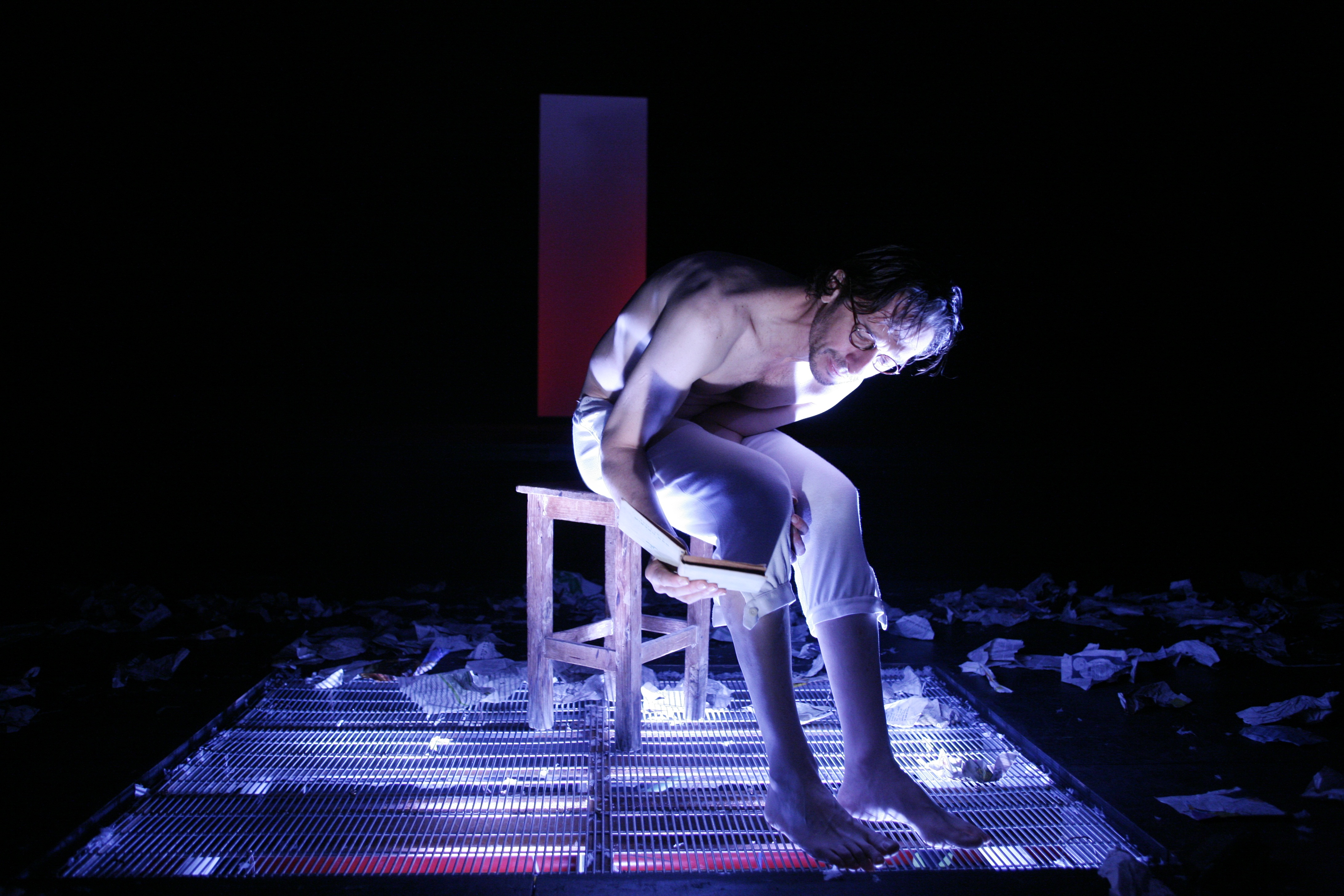 סשה דמידוב בהצגה שונאים סיפור אהבה, תיאטרון גשר